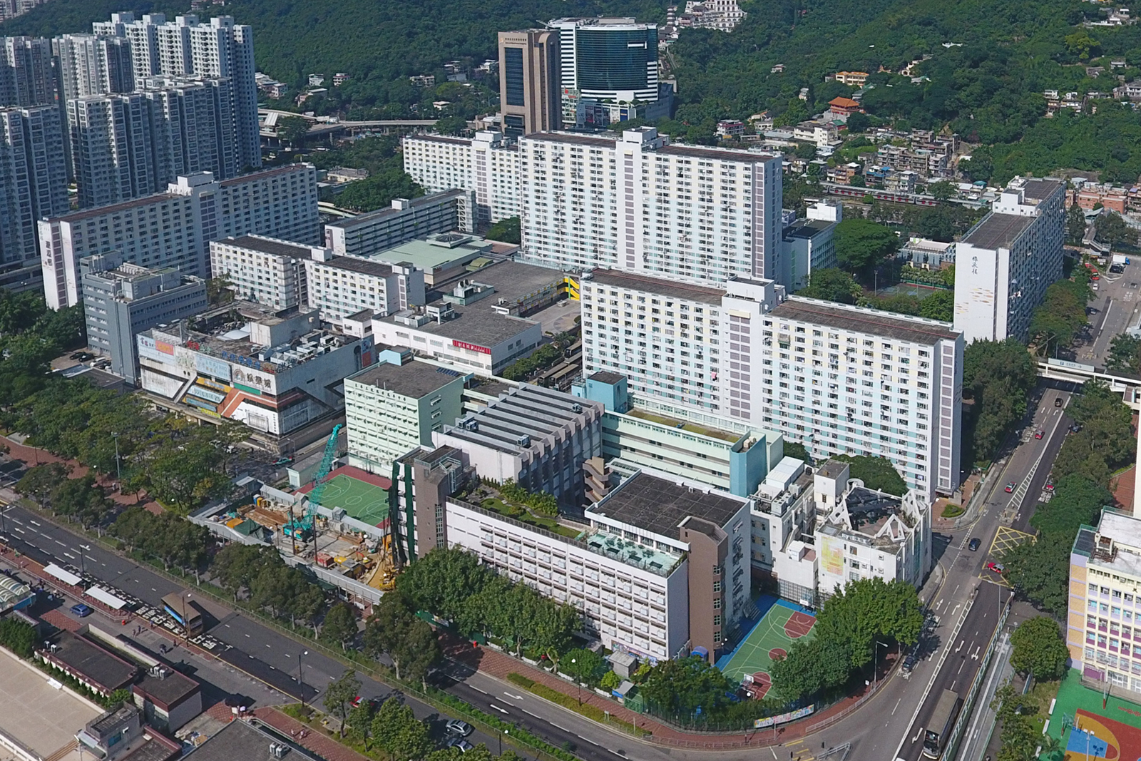 Lek Yuen Estate Overview